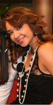 Actríz Daniela Luján